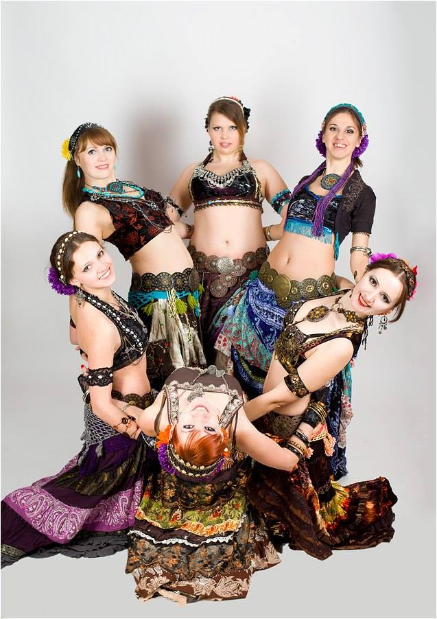 Фото танцювального трайбл-клану Drakaris.